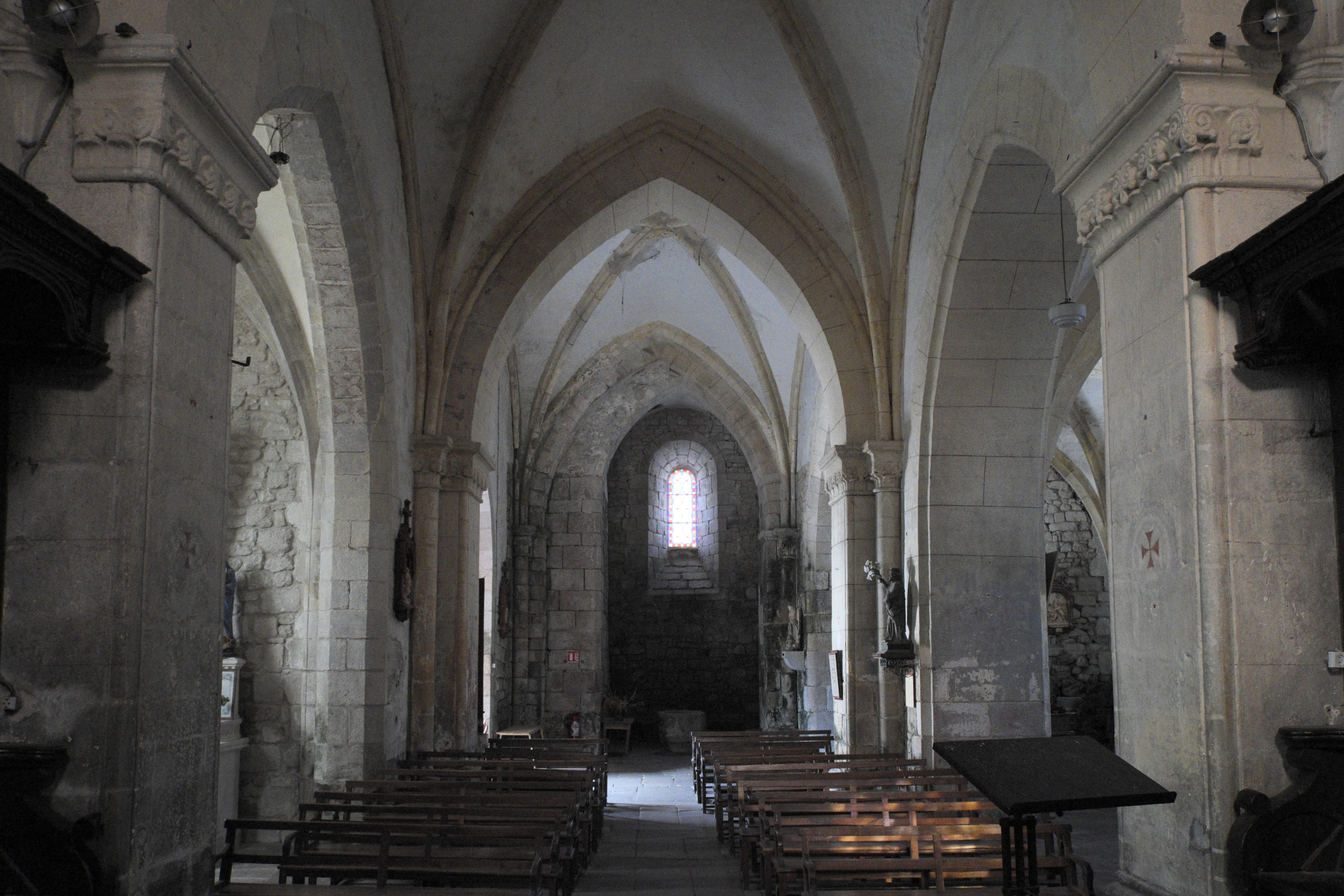 Katholische Kirche Saint-Sylvestre in Saint-Sylvestre im Département Haute-Vienne (Nouvelle-Aquitaine/Frankreich), Innenraum